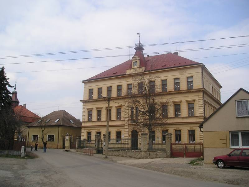 Základní škola Nučice, okres Praha-západ